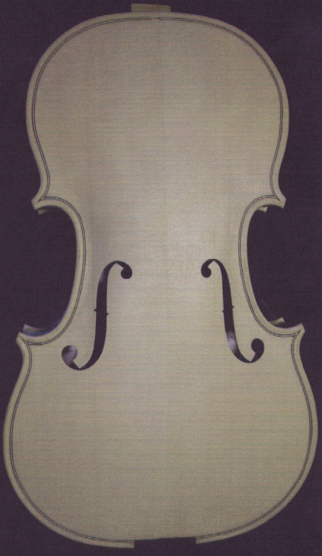 weiß fertiger Geigenkorpus ohne Hals, nach der Medici (1716) von Stradivari